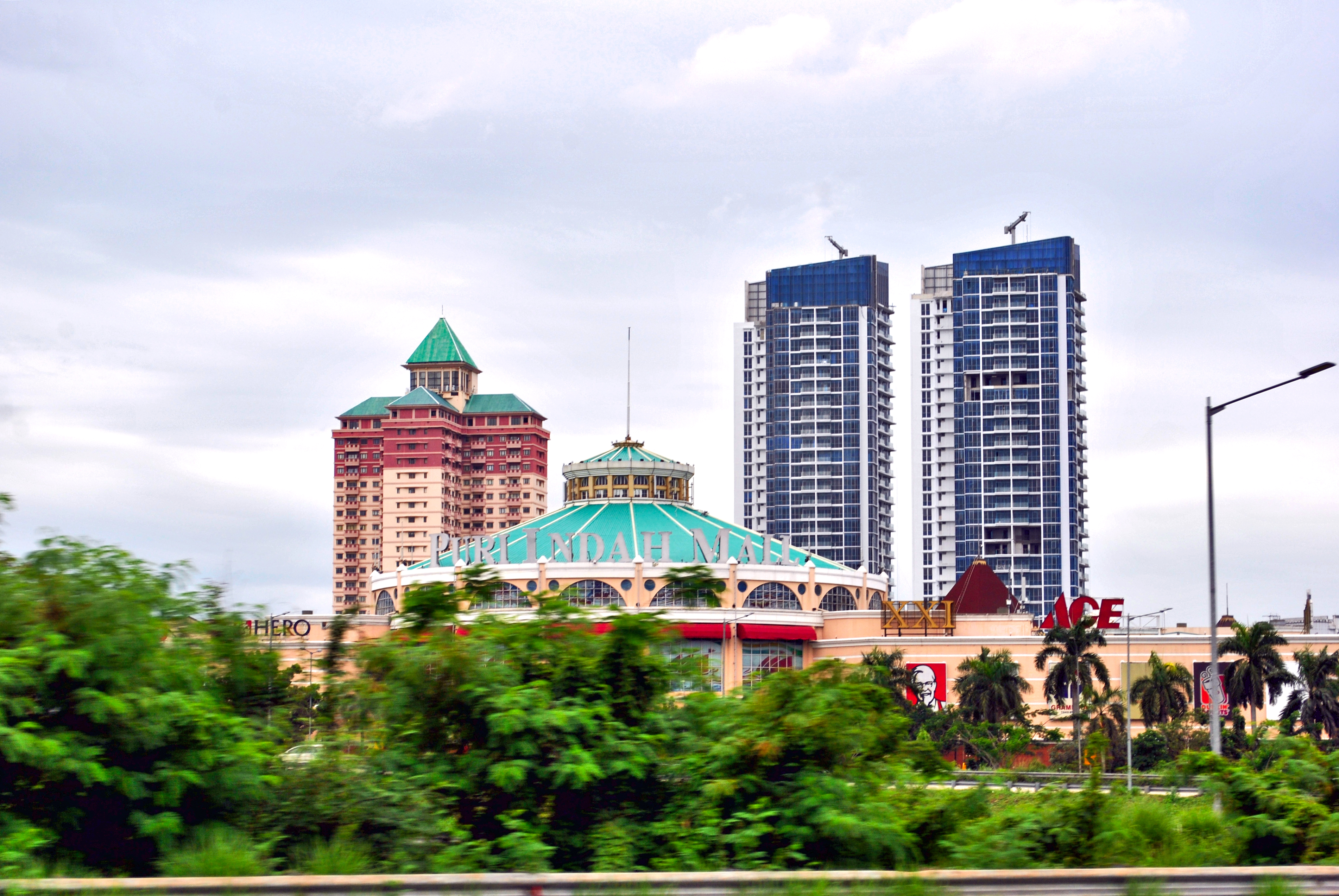 Mal Puri Indah